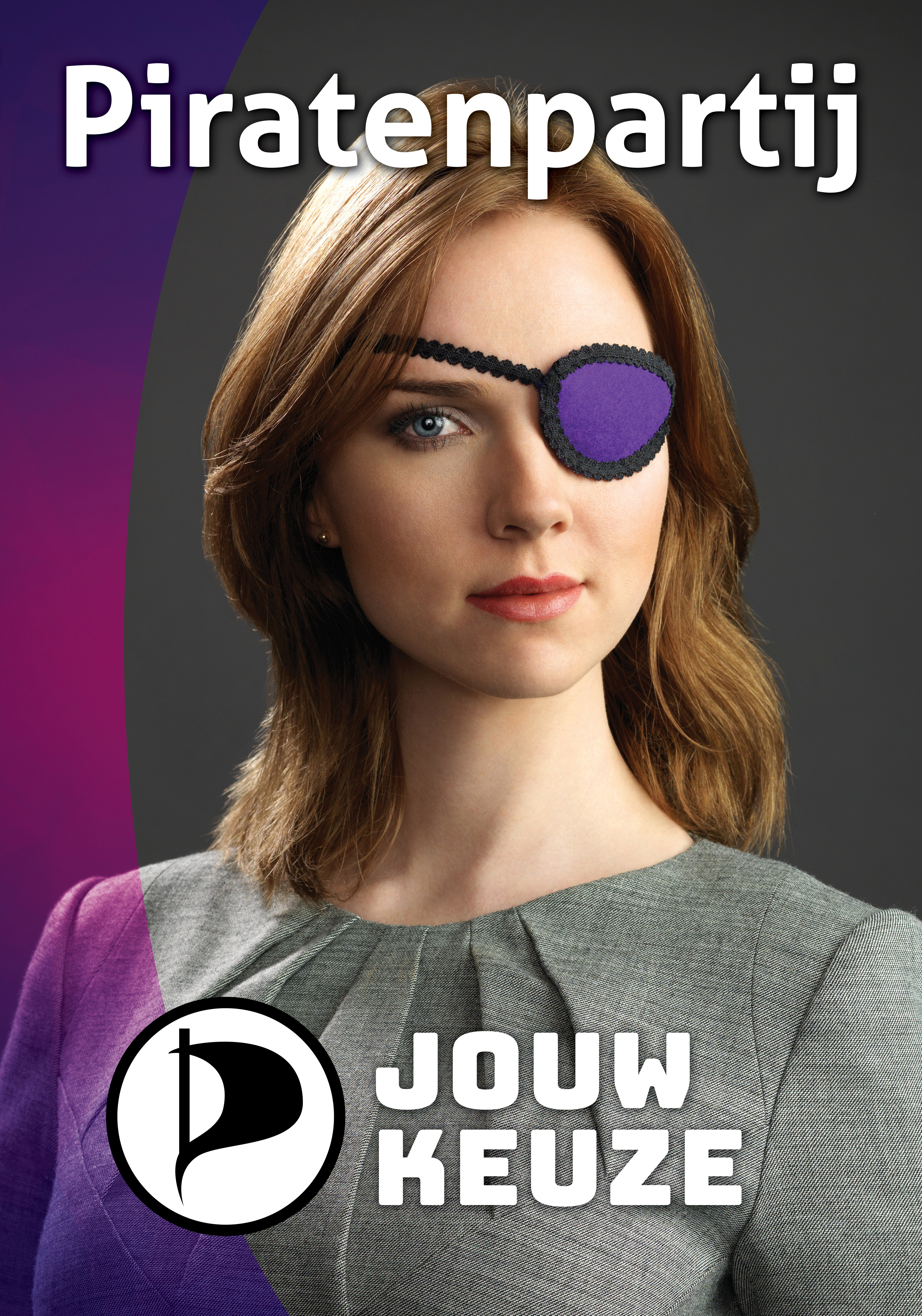 Campagneposter die bij de tweede kamer verkiezingen 2017 door de piratenpartij werd gebruikt